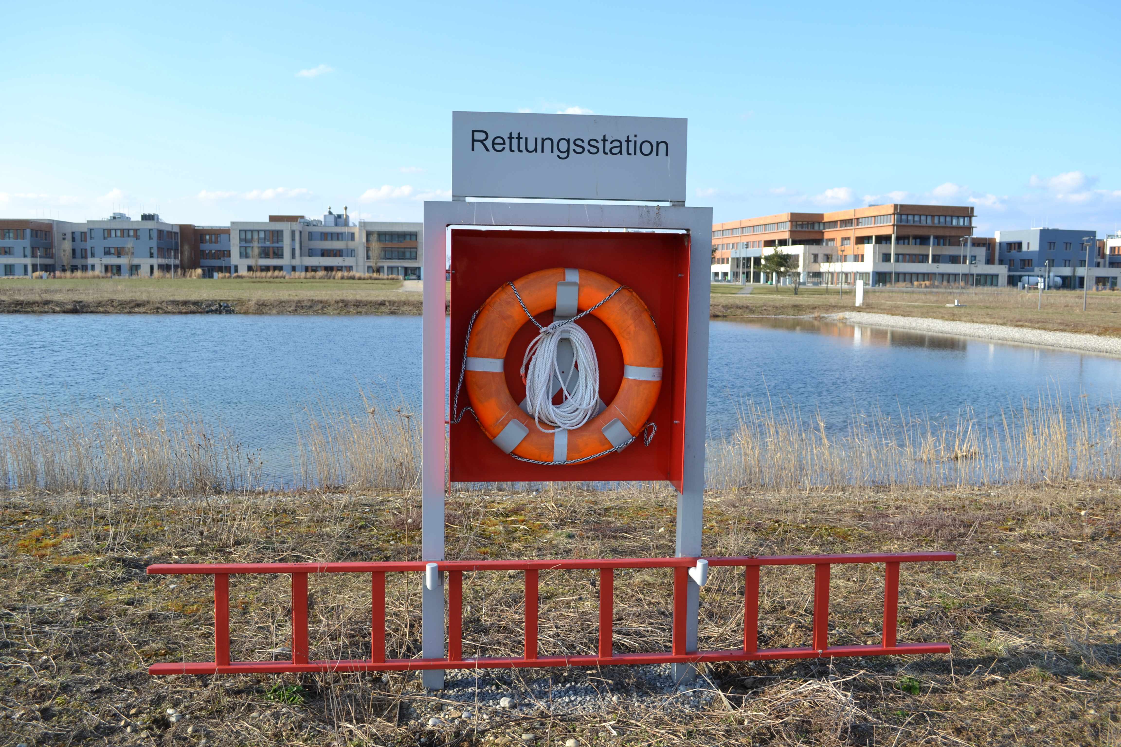 Rettungsring mit Rettungsleiter neben dem künstlichen See des Campeons.